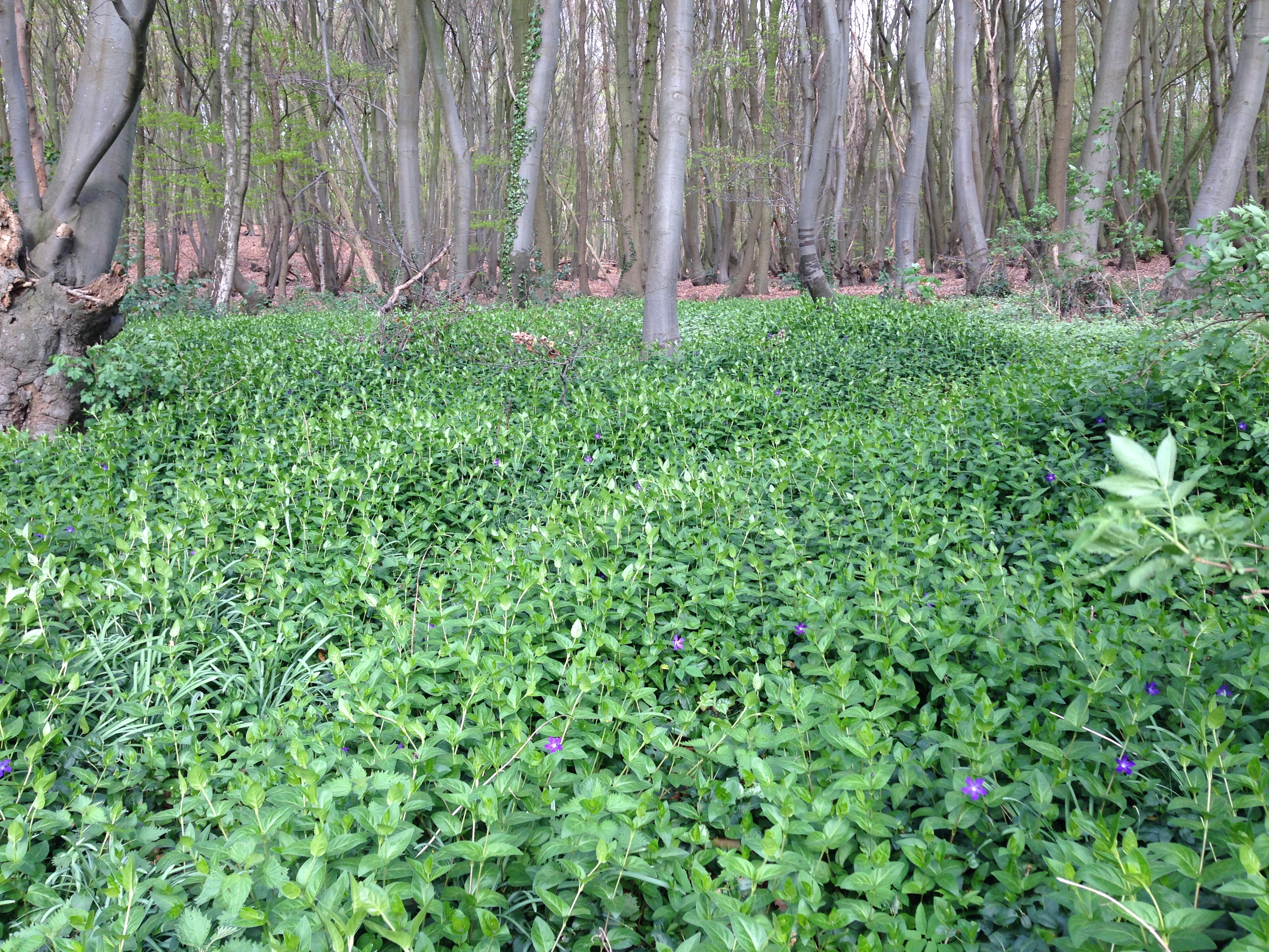 Verwildertes Immergrün am Waldrand der Hinsbecker Schweiz